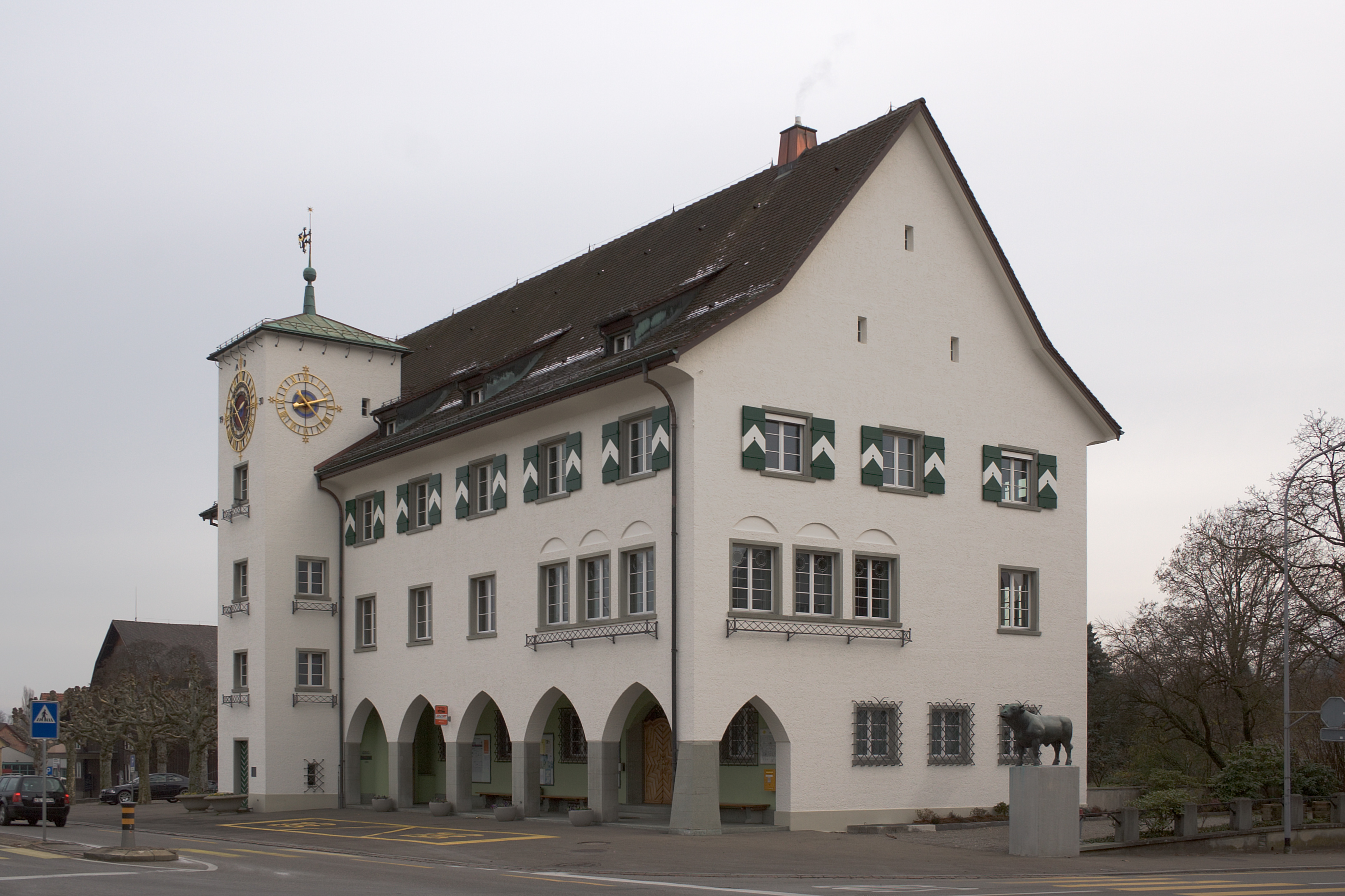 Gemeindehaus Amriswil, Schweiz (Da Amriswil seit 2005 eine Stadt ist heißt das Haus Stadthaus)